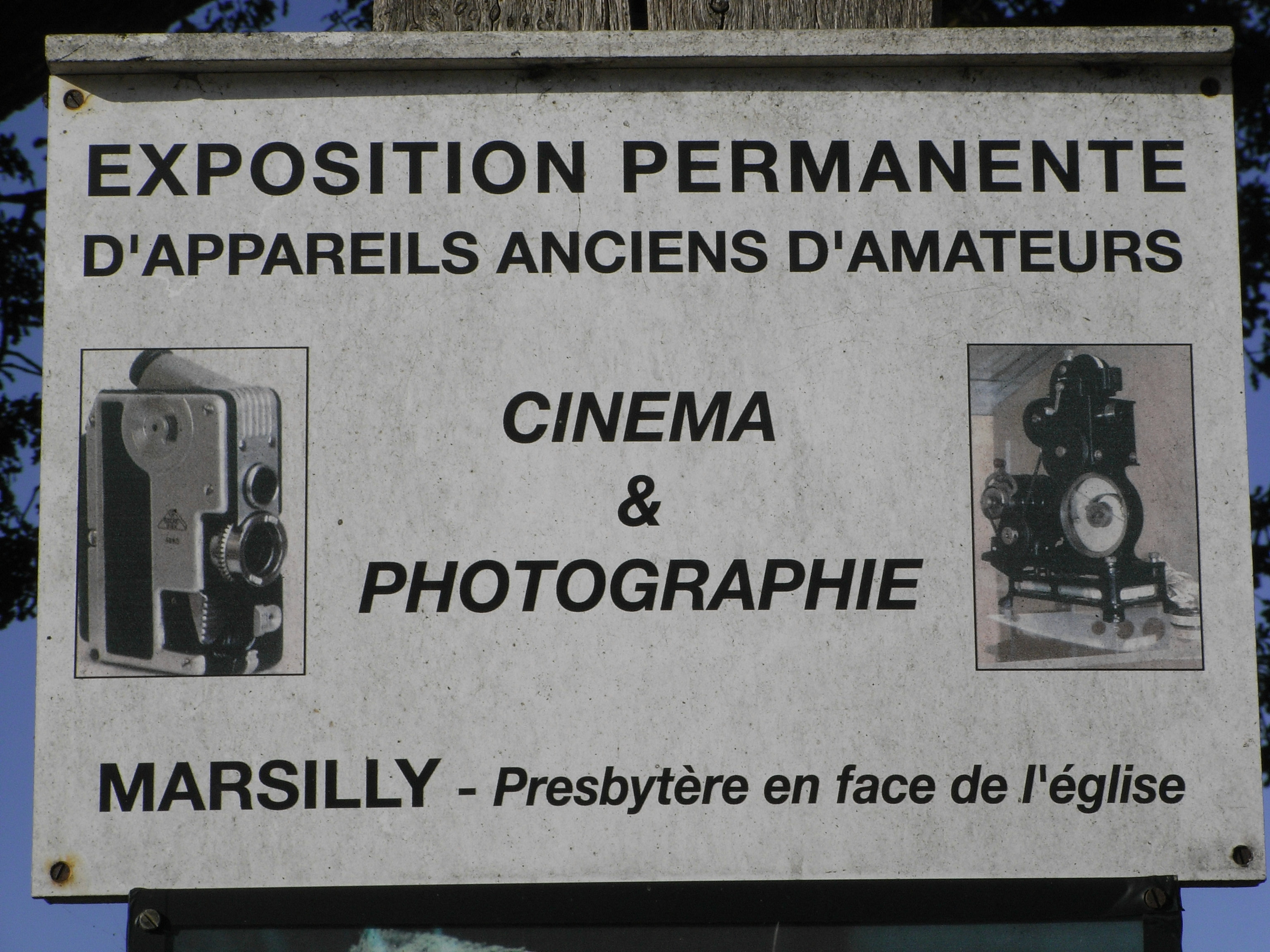 Annexe de la Maison du graffiti ancien, musée à Marsilly (Charente-Maritime - France)